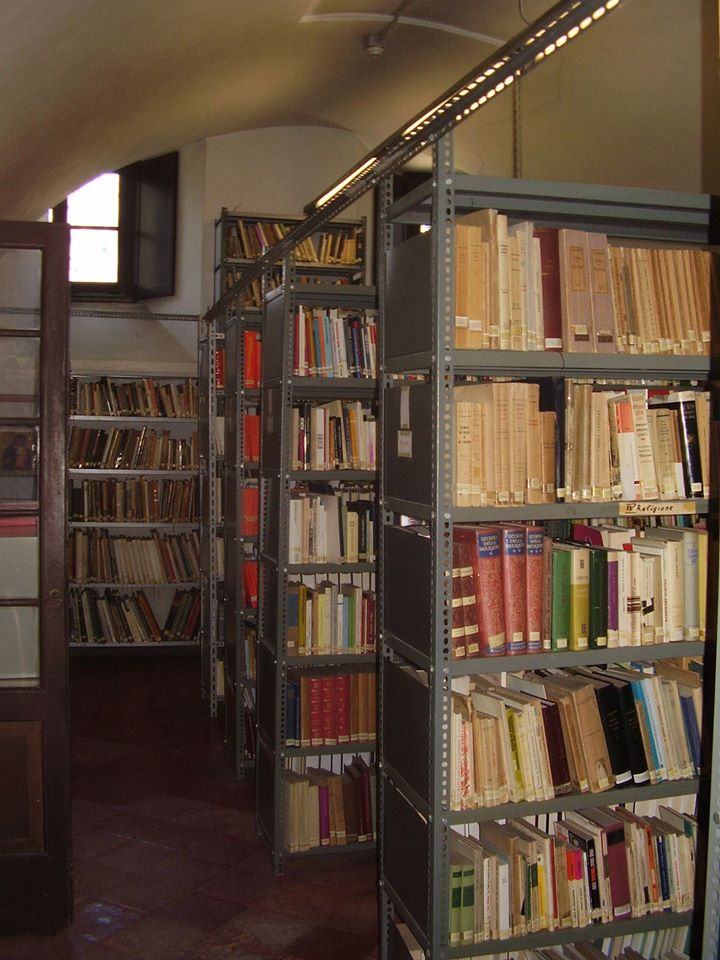 Библиотека центра Христианская Россия на вилле Амбивери в Сериате